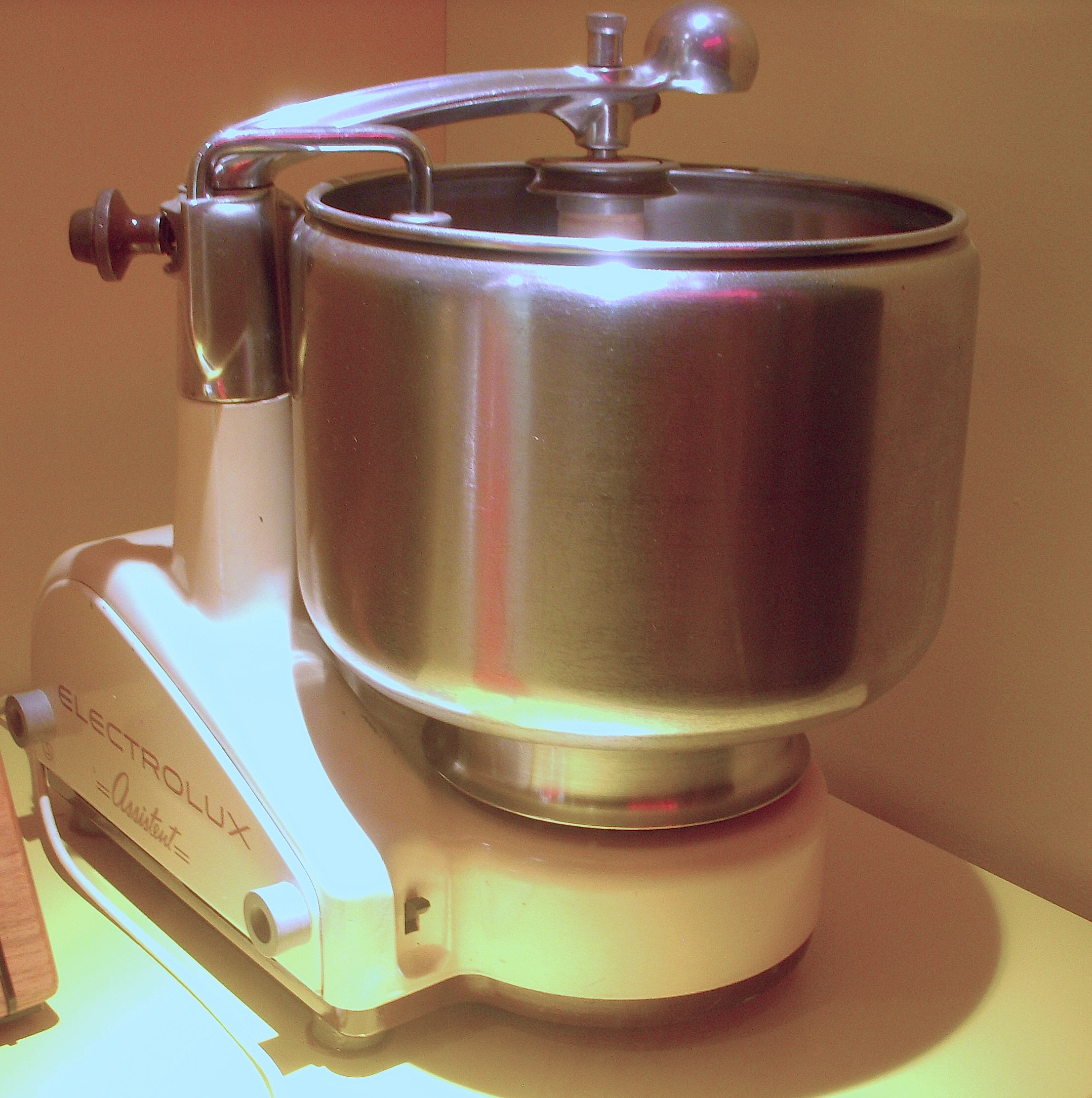 Nationalmuseum, Stockholm, Electrolux "assistent"